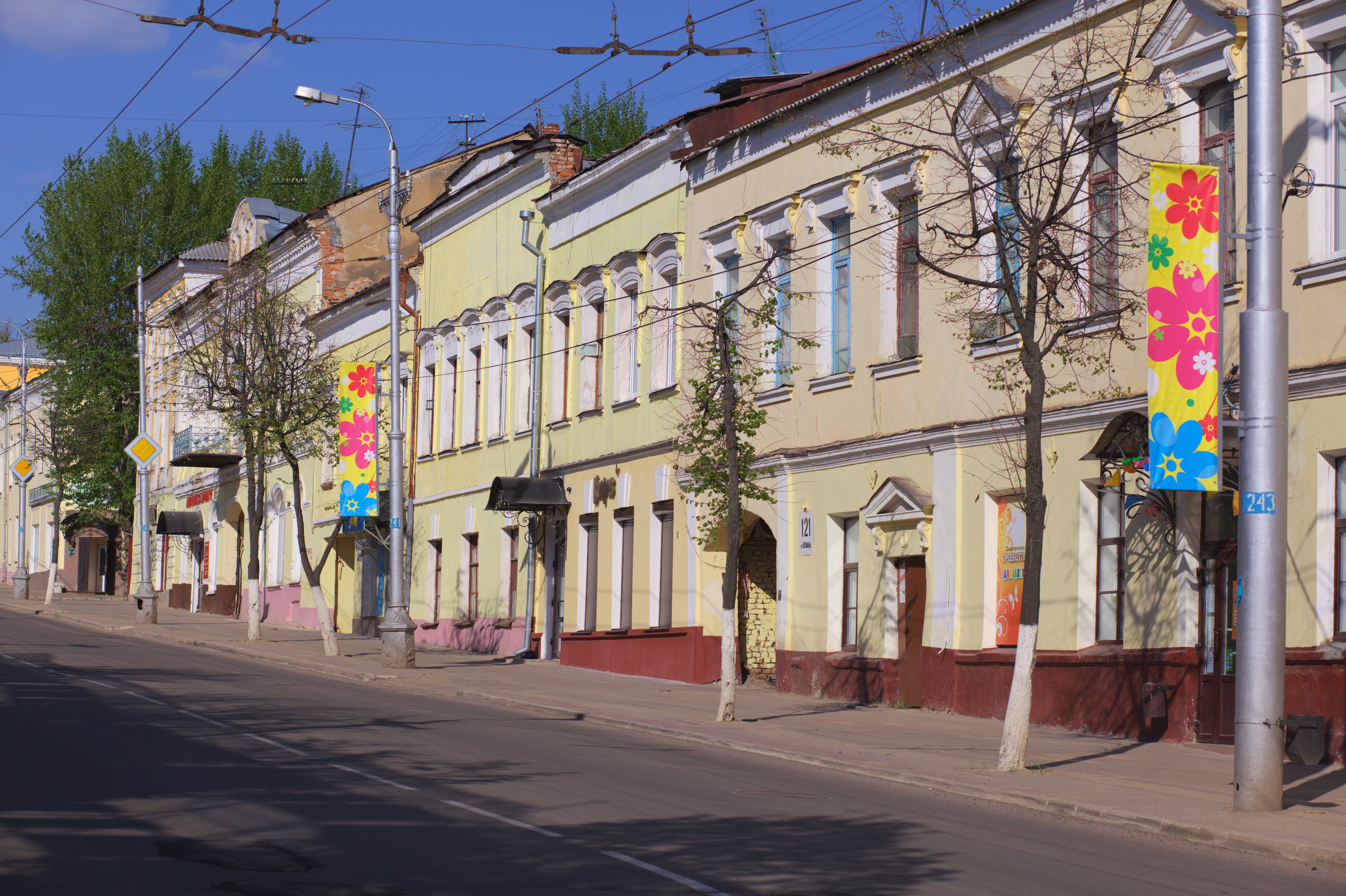 Калуга, улица Ленина